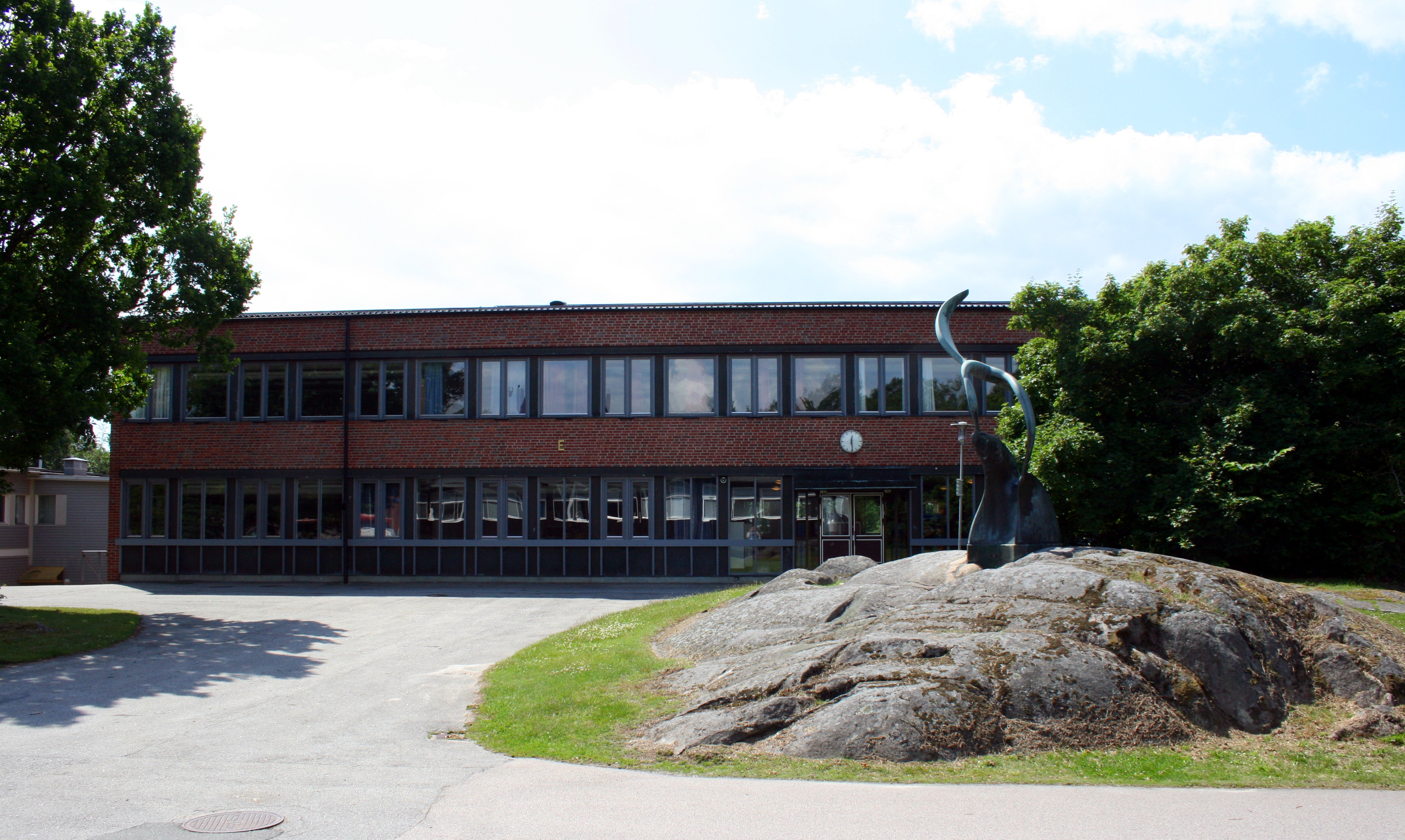 Väggaskolan i Karlshamn. Senare tillbyggnad.